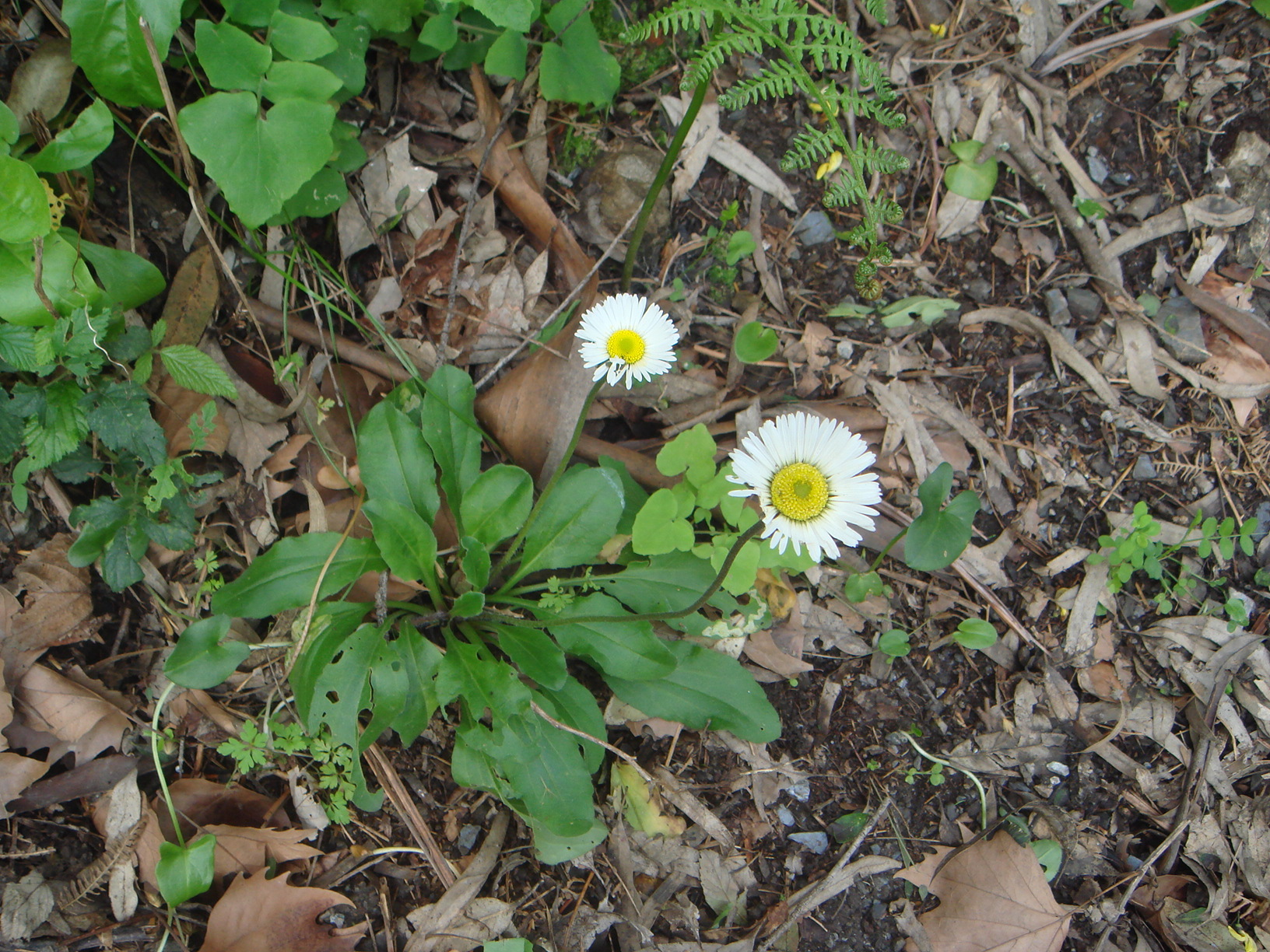 Bellis rotundifolia, (Desf.) Boiss. & Reuter,Ceuta, España